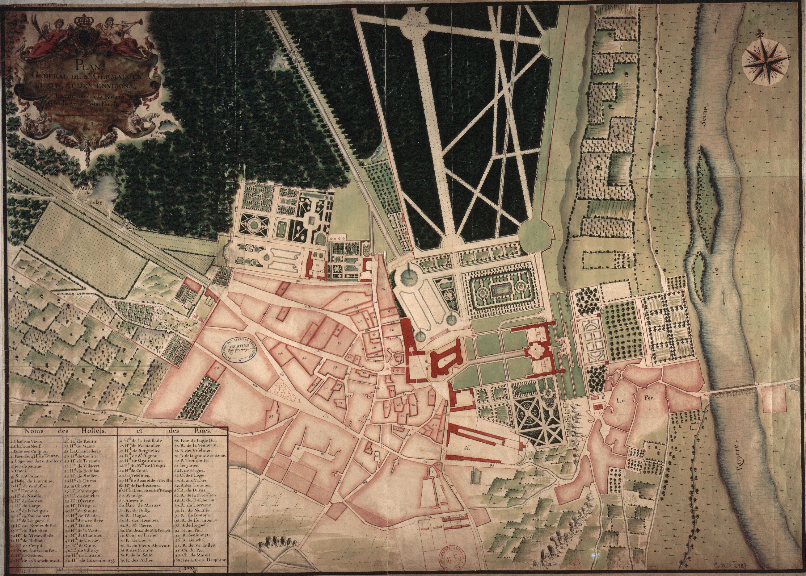 Plan general de St Germain en Laye et des environs tant du costé de la rivière que du costé de la Forest